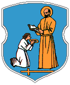 Herb Żyrowic